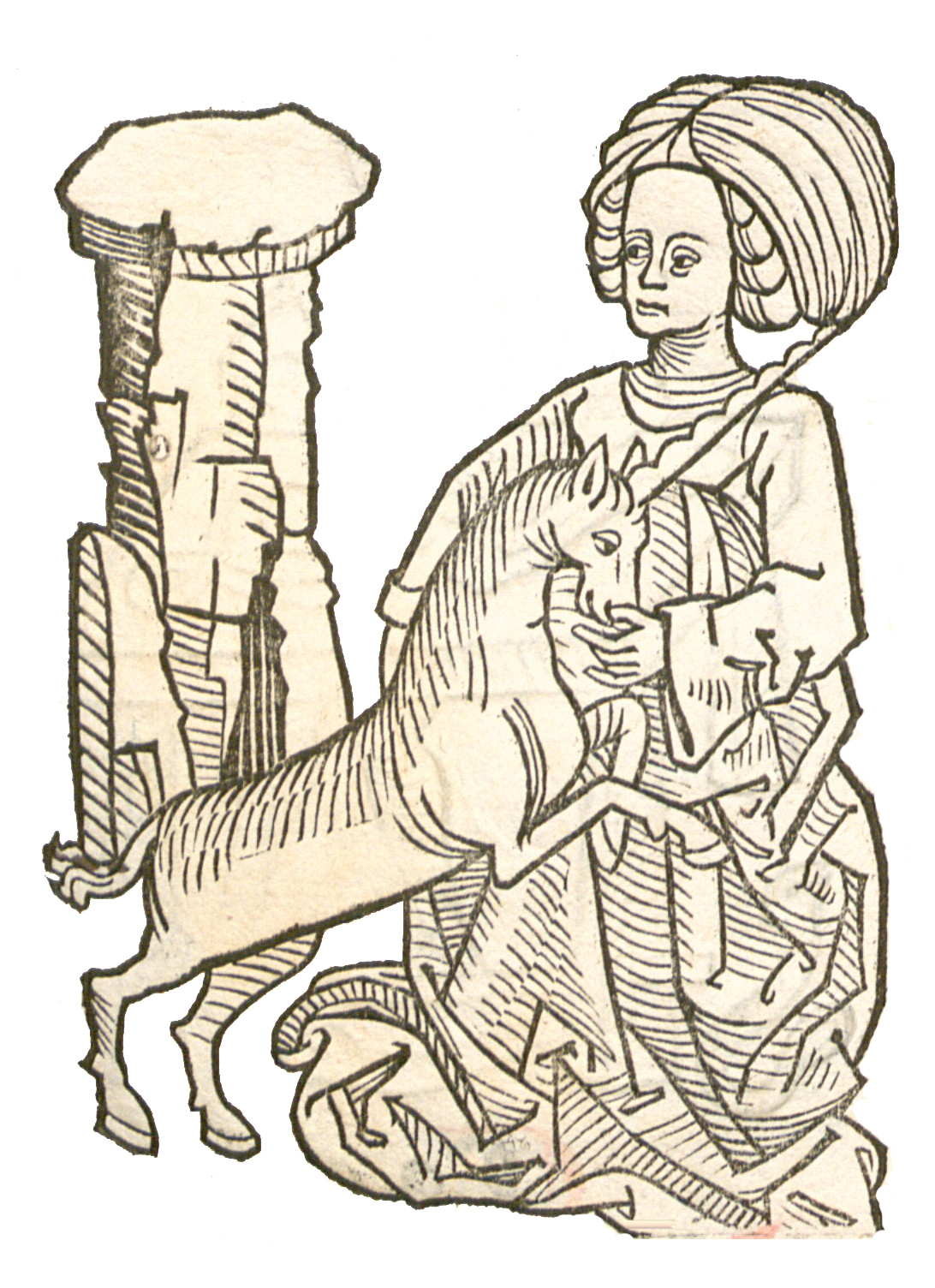 Abbildung von Unicornus-Einhorn